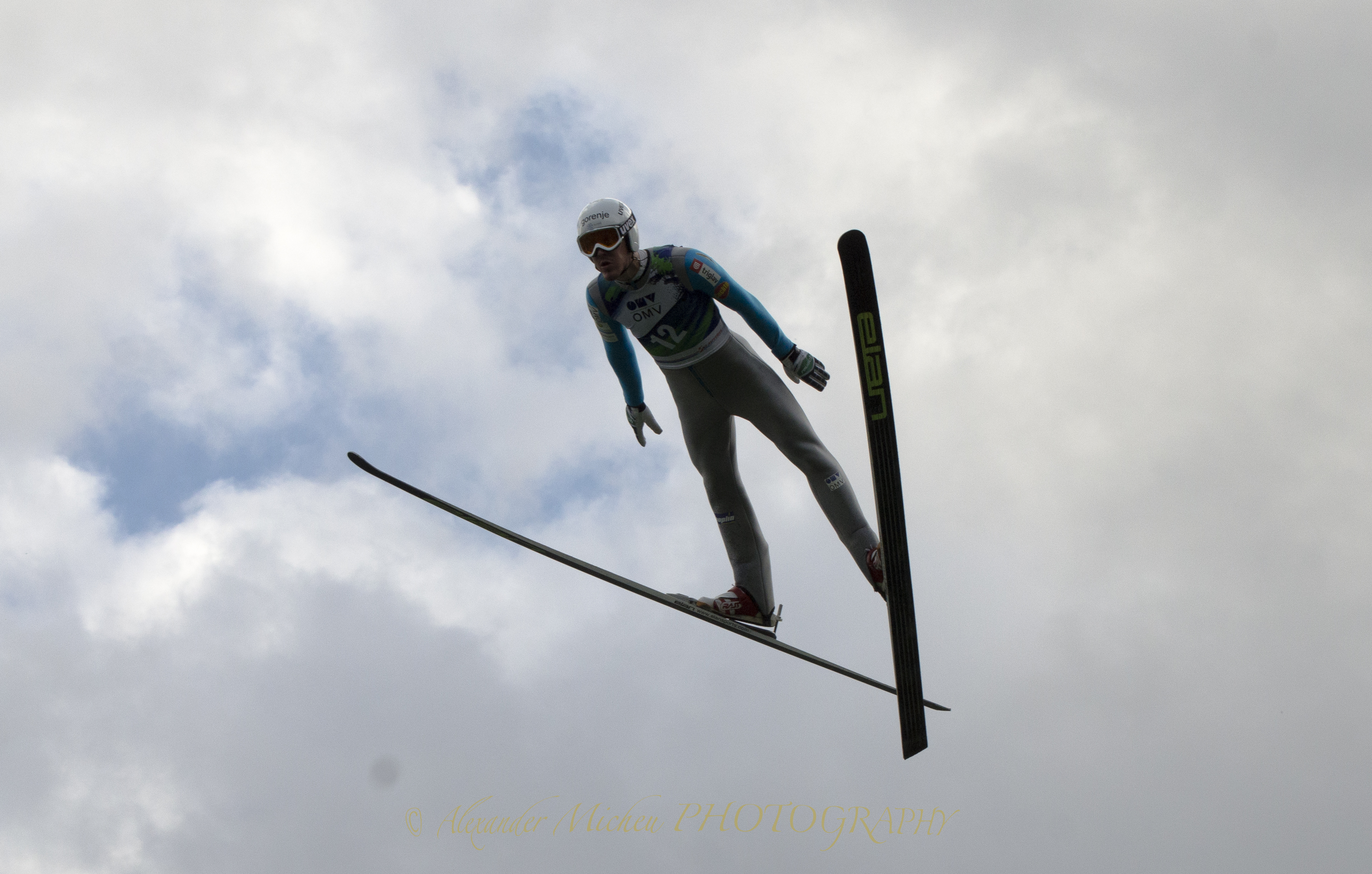 FIS Sommer Grand Prix Nordische Kombination 27. / 28. August 2013 Villach Möltschach